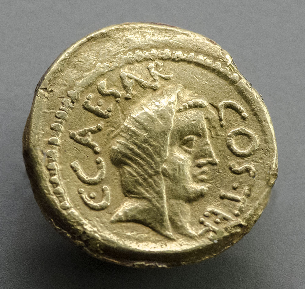 Moneda romana en oro de Caius Iulius Caesar, nacido hacia el año 100 a.C. y muerto en el 44 a.C. Fotografía tomada en la vitrina, a través del cristal.